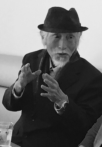 西郷竹彦の写真